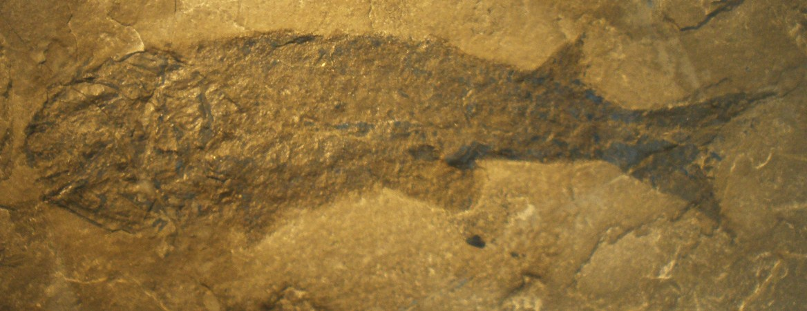 Fossil of Cheirolepis, an extinct fish Took the photo at Musee d'Histoire Naturelle, Brussels